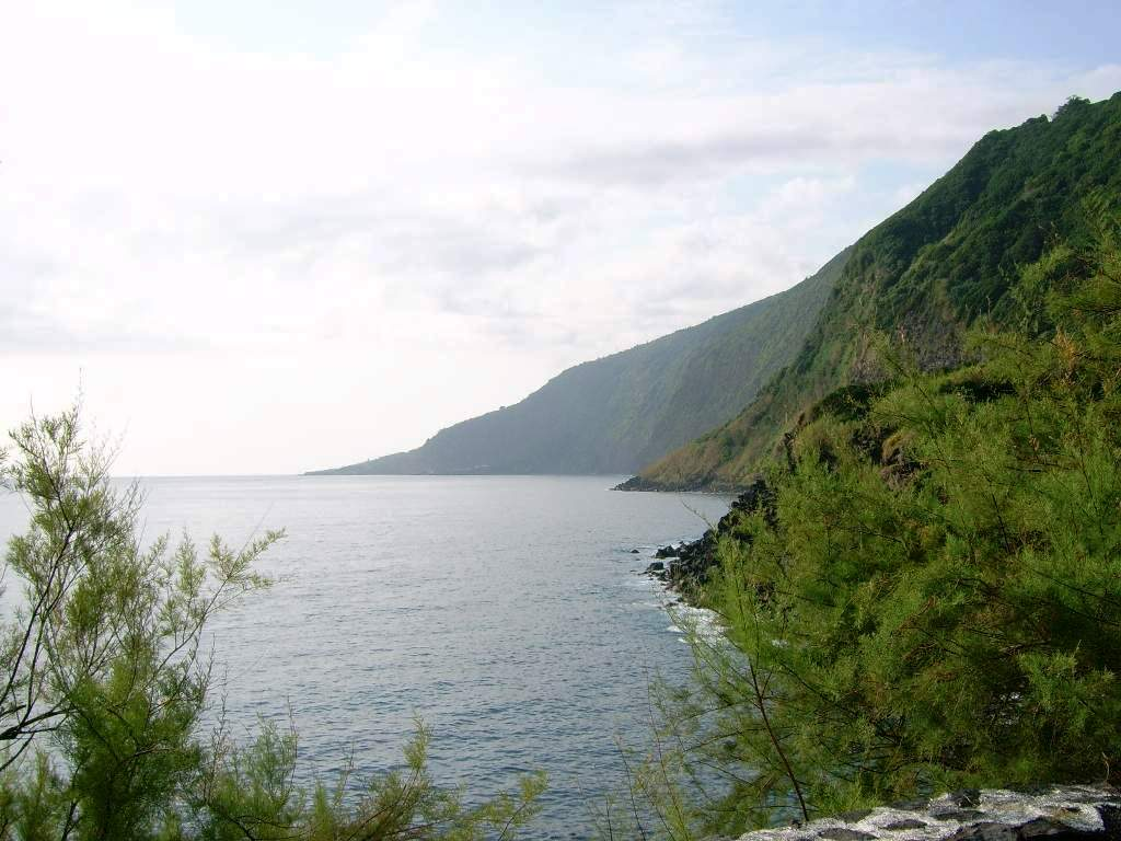 Vista parcial da Fajã Grande, ilha de São Jorge, Açores, Portugal